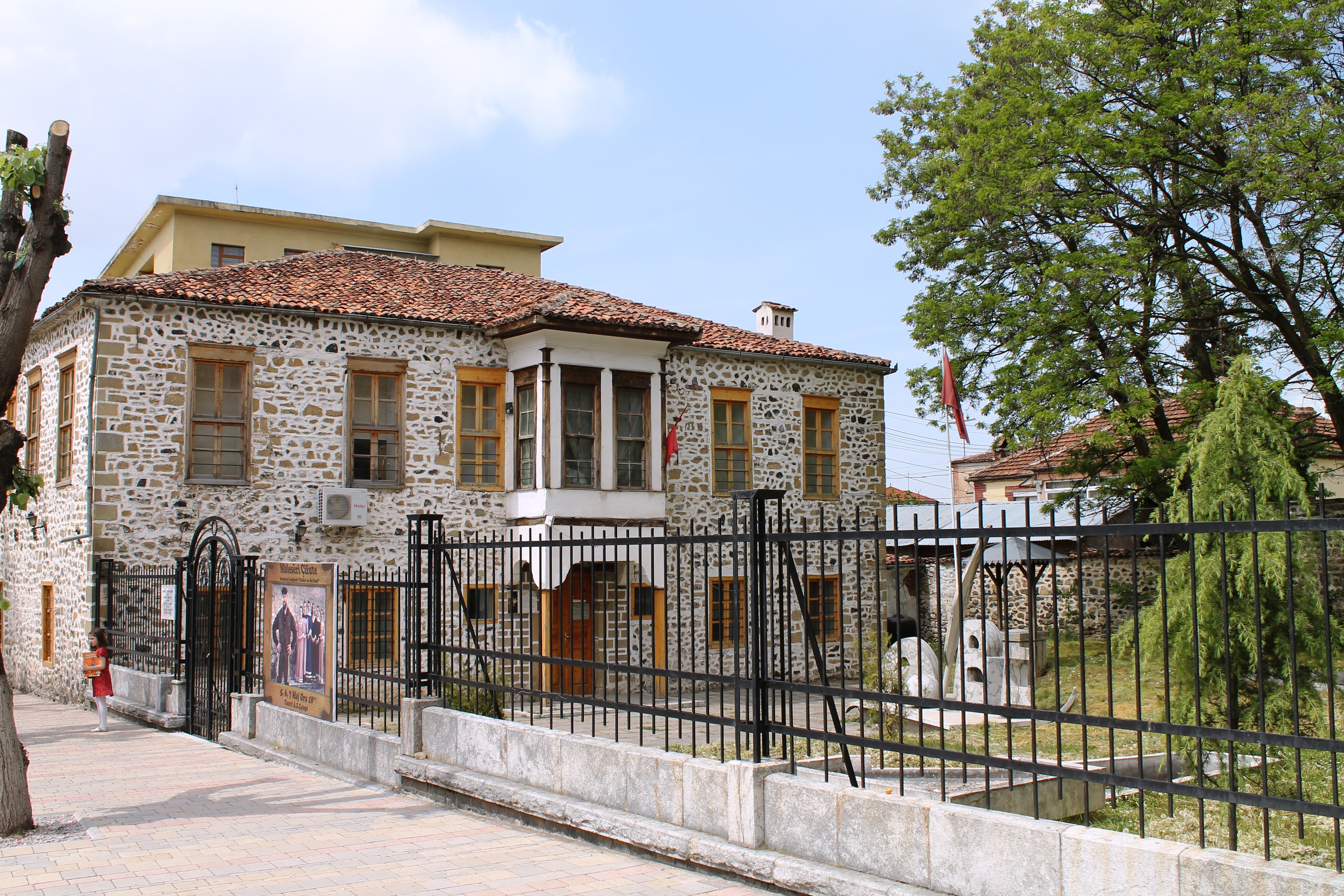 Korçë-Shkolla e parë shqipe